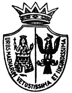 Variante dello stemma di Mineo